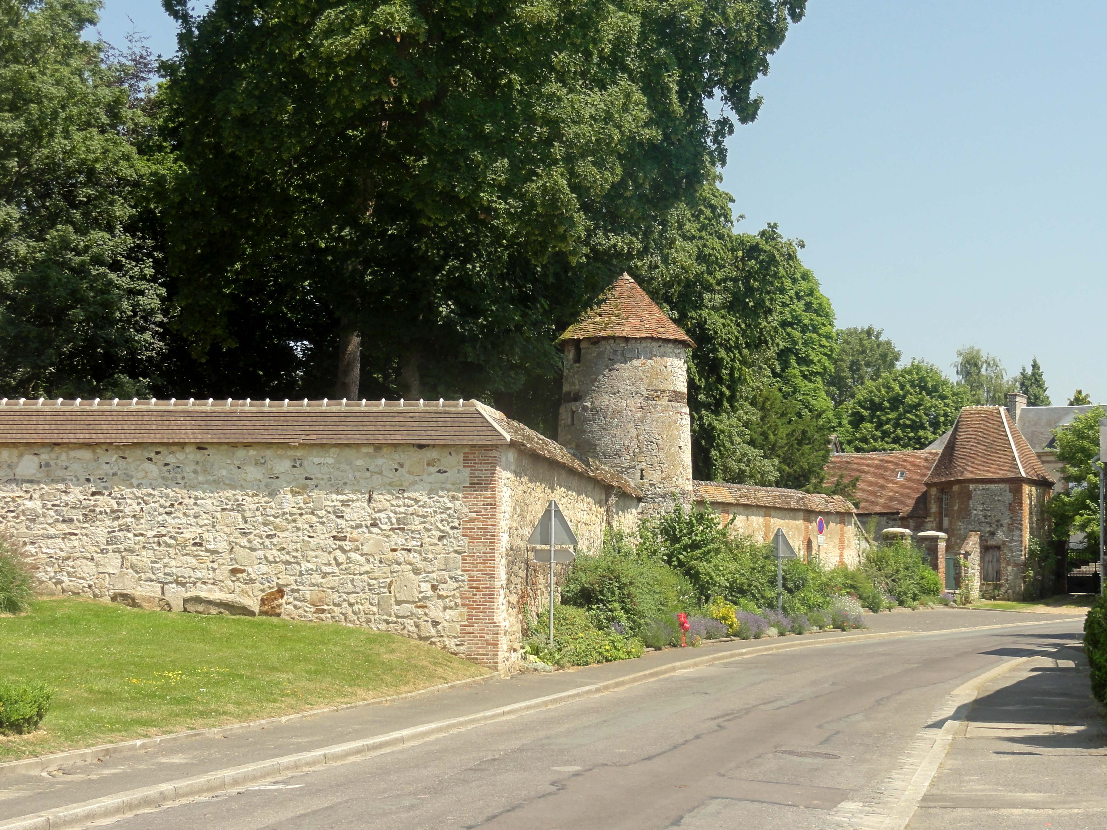 Enceinte de l'abbaye avec la tour dite « tour guerrière », rue Michel-Greuet.